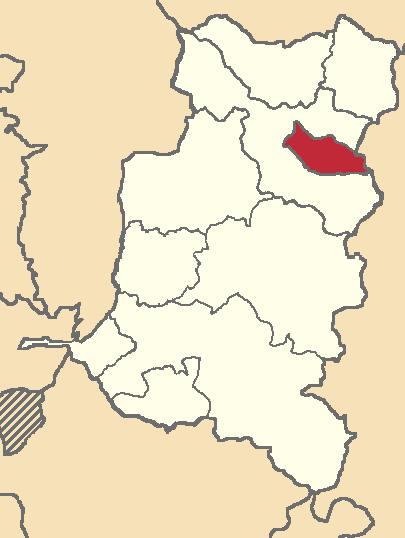 Mapa localizacor del cantón en Chimborazo, Ecuador